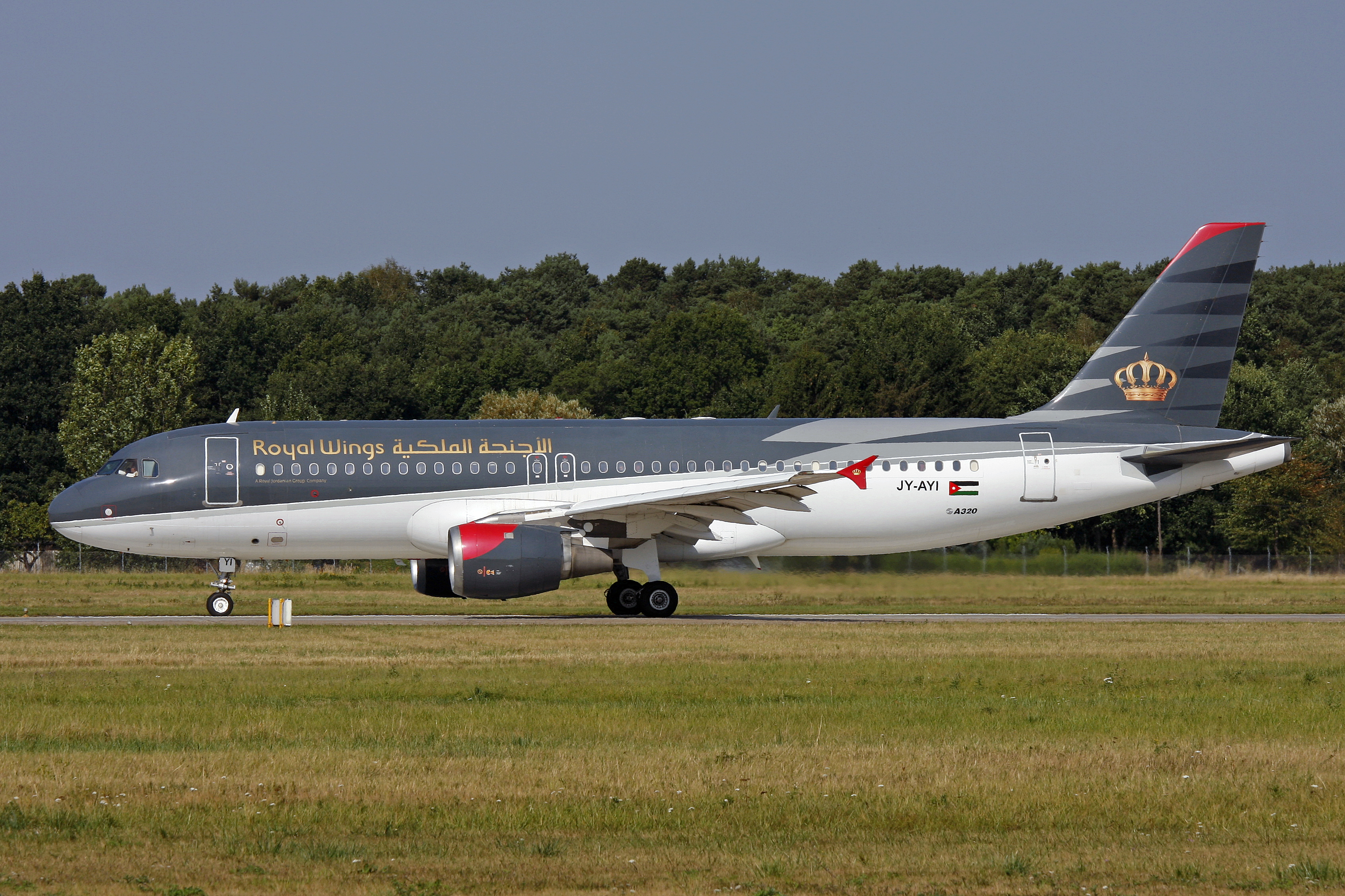 Haj / Eddv 08-09-09